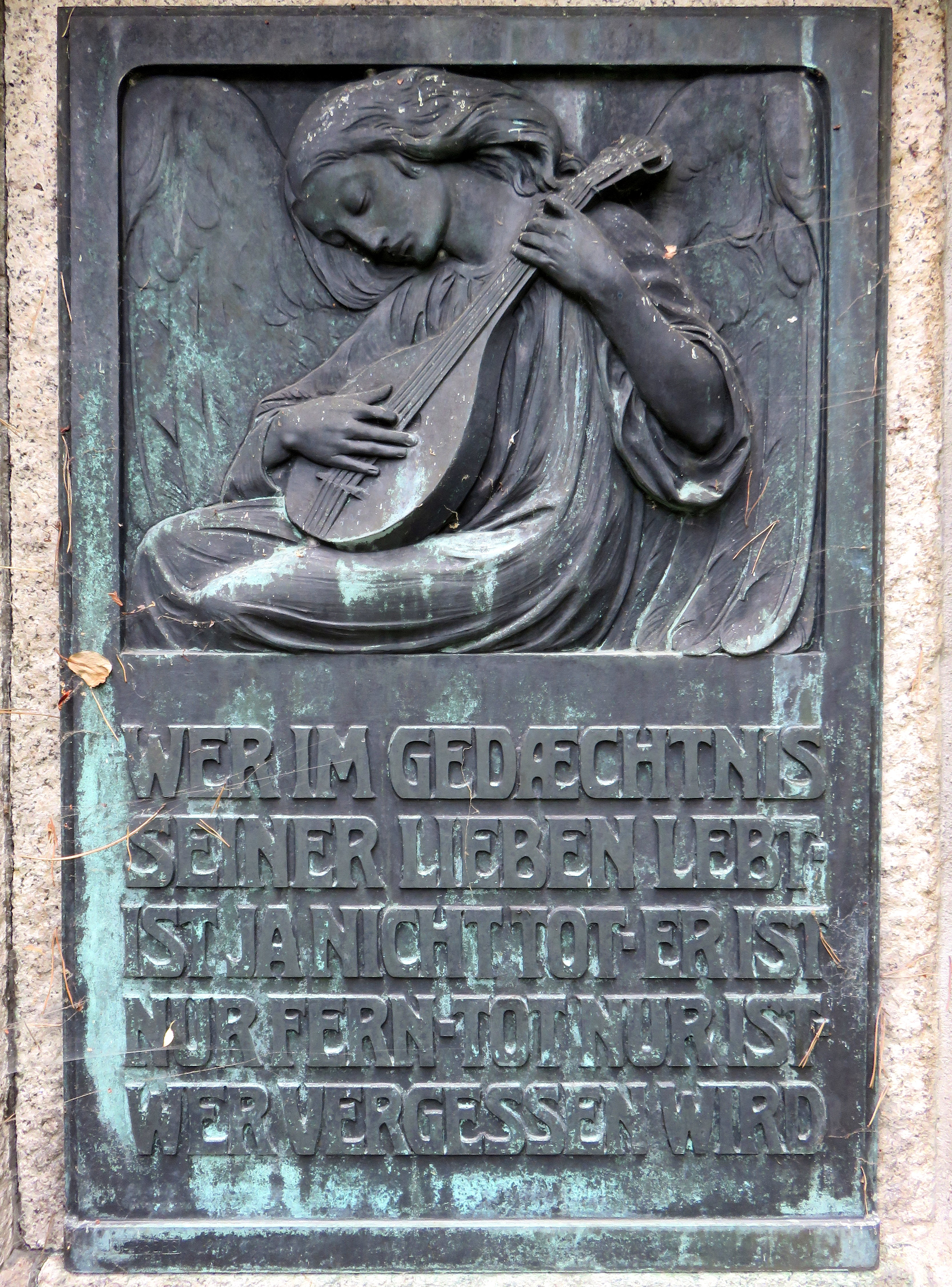 Grabstätte für die Familie des Gründers des Hamburger Hotels Vier Jahreszeiten, Friedrich Haerlin, sowie seinen Sohn und Nachfolger Fritz Haerlin (1897–1975), Friedhof Ohlsdorf, Planquadrat M 23 (südlich Wasserturm). Die Bronzereliefs an der dreiteiligen Grabwand wurden 1911 vom deutschen Bildhauer Karl Garbers geschaffen.